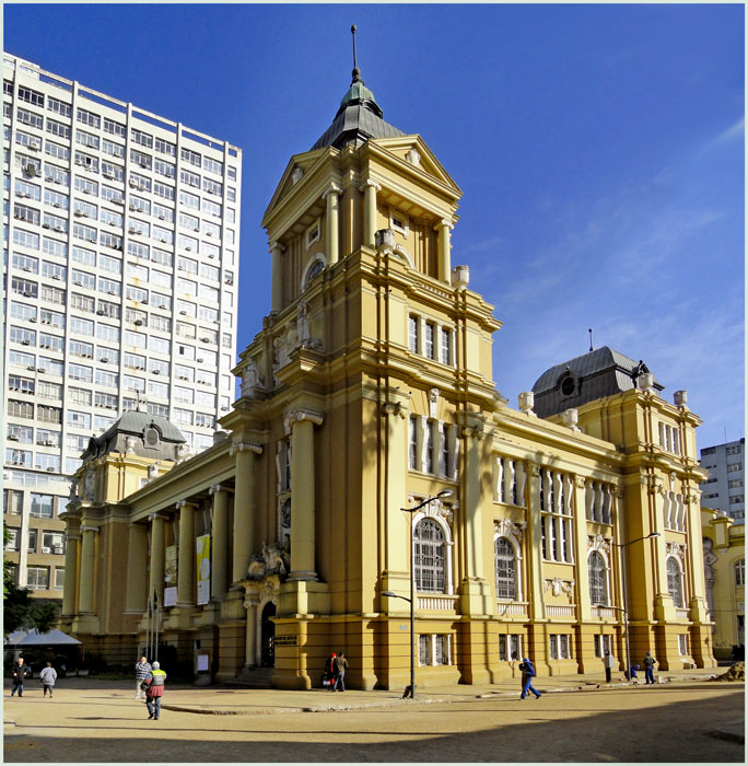 MARGS